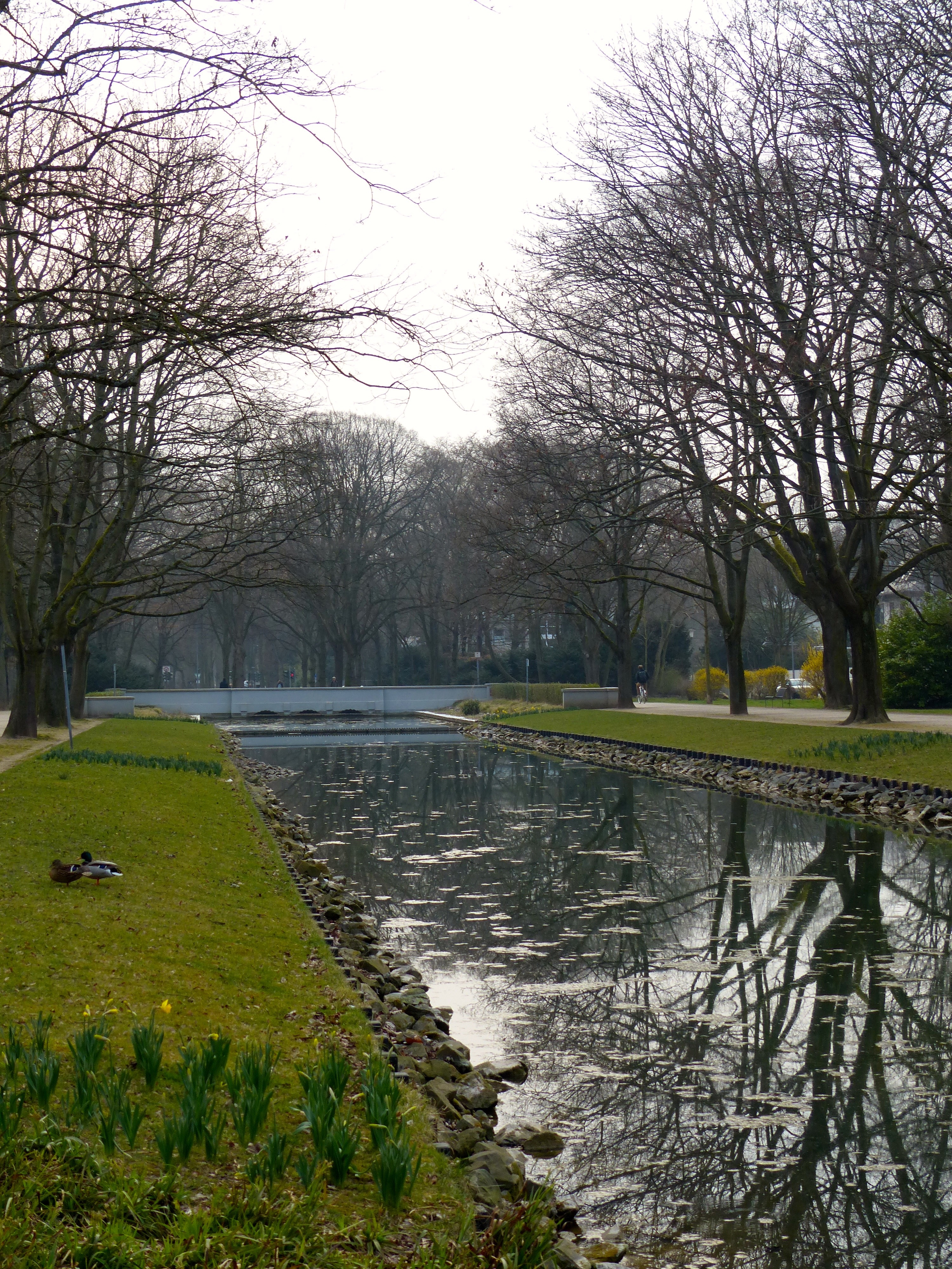 Köln- Lindenthal: Geschützer Landschaftsbestandteil LB 3.02 der Stadt Köln: Rautenstrauchkanal